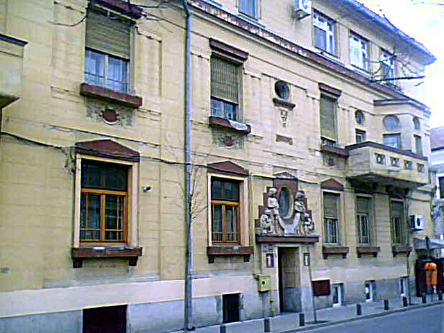 Casa monument istoric (Palatul FENYVES)-Arad.